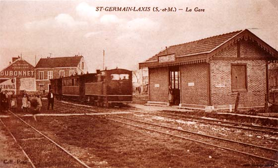 Gare de Saint-Germain-Laxis vers 1935.